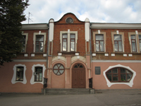 Детская музыкальная школа № 1 г. Пензы. Основана в 1882 году. Объект культурного наследия, памятник истории и культуры. Здание построено в тиле модерн. Children's musical school № 1 cities of Penza has been opened in 1882. The Building it is constructed in a modernist style.